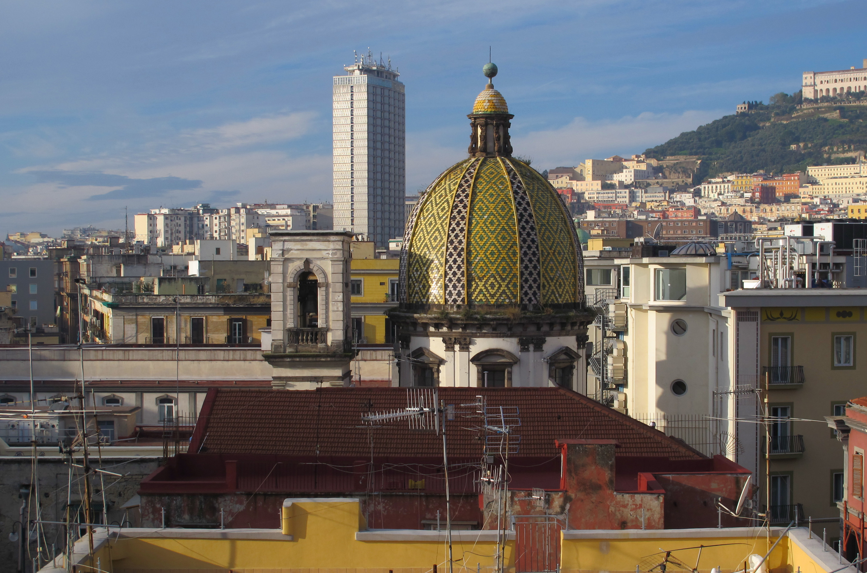 Napoli